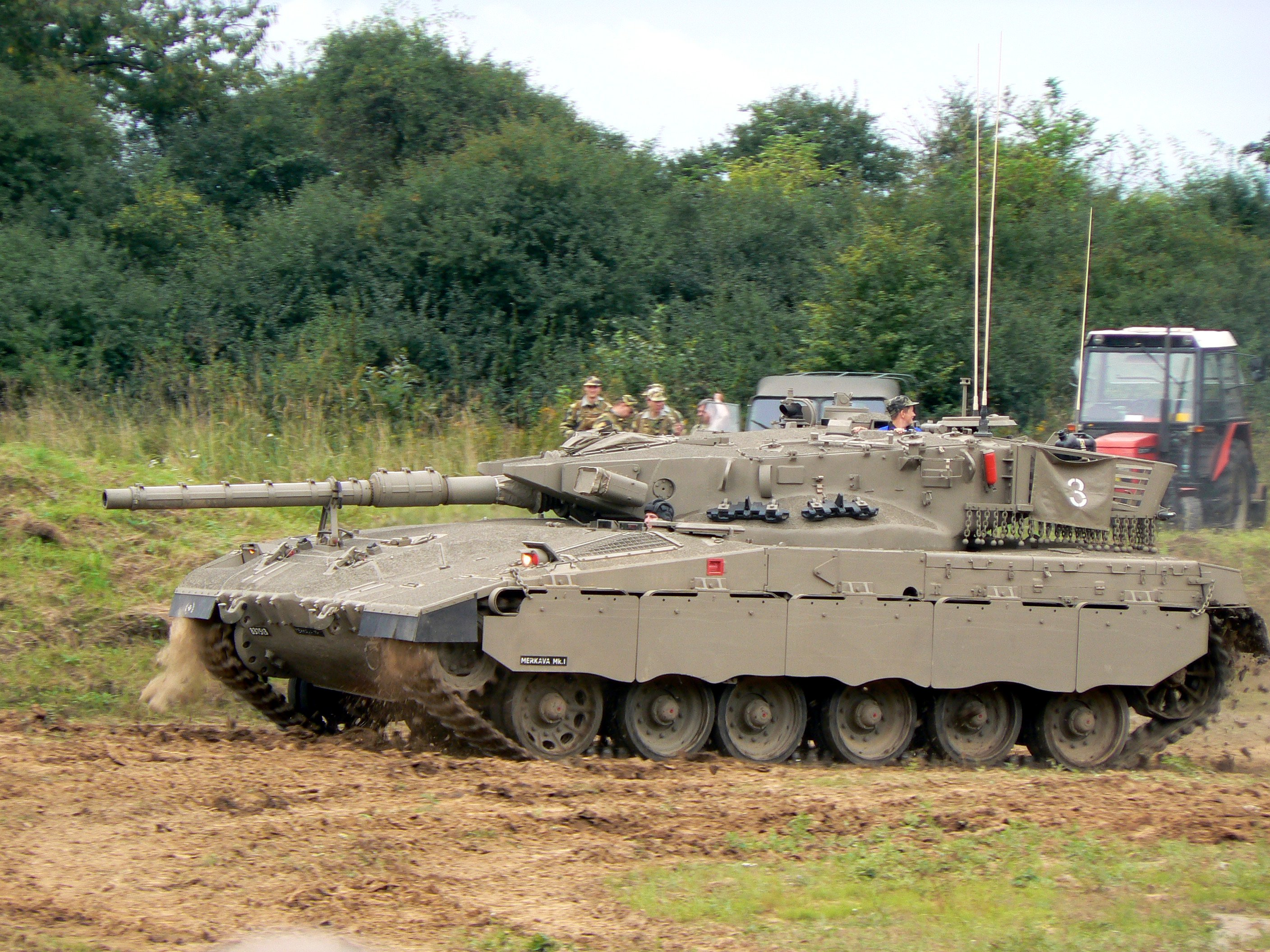 Tank Merkava Mk1